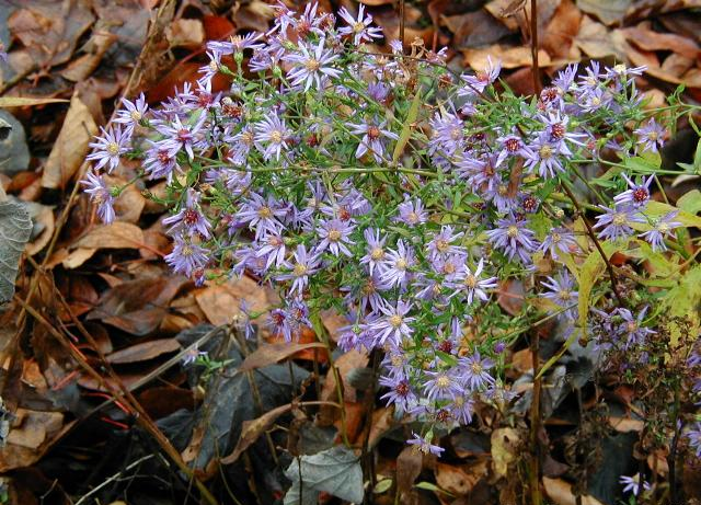 Aster cordifolius